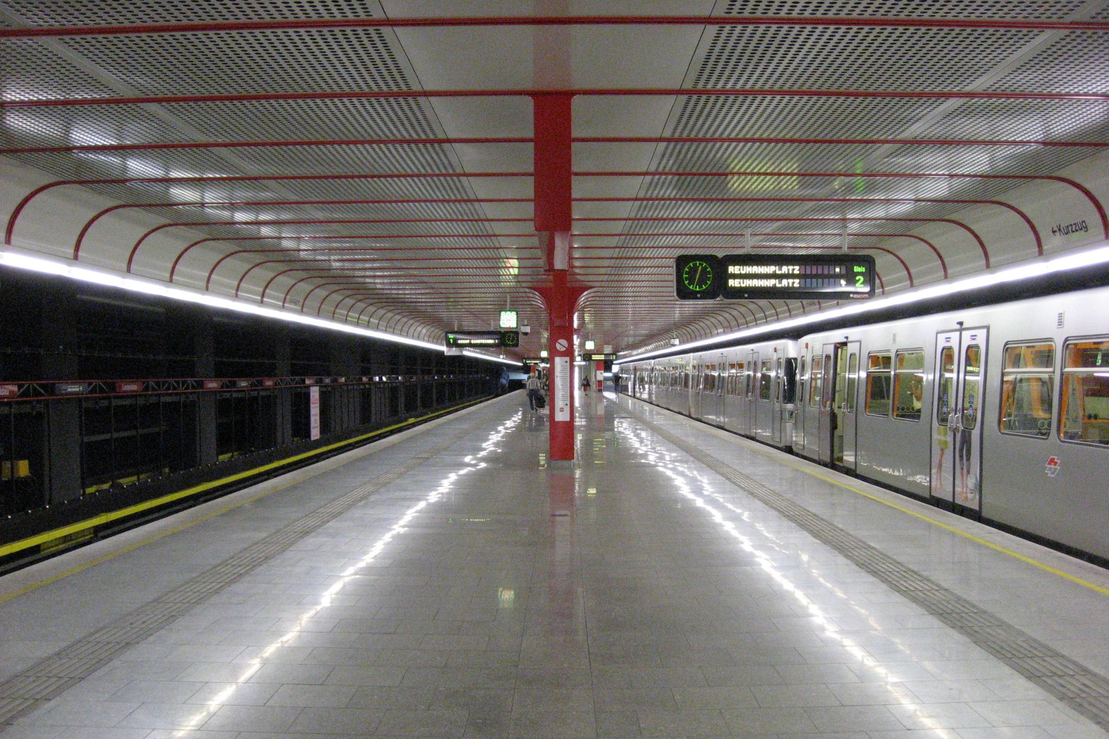 Bahnhof Wien Leopoldau Bahnsteig U-Bahn